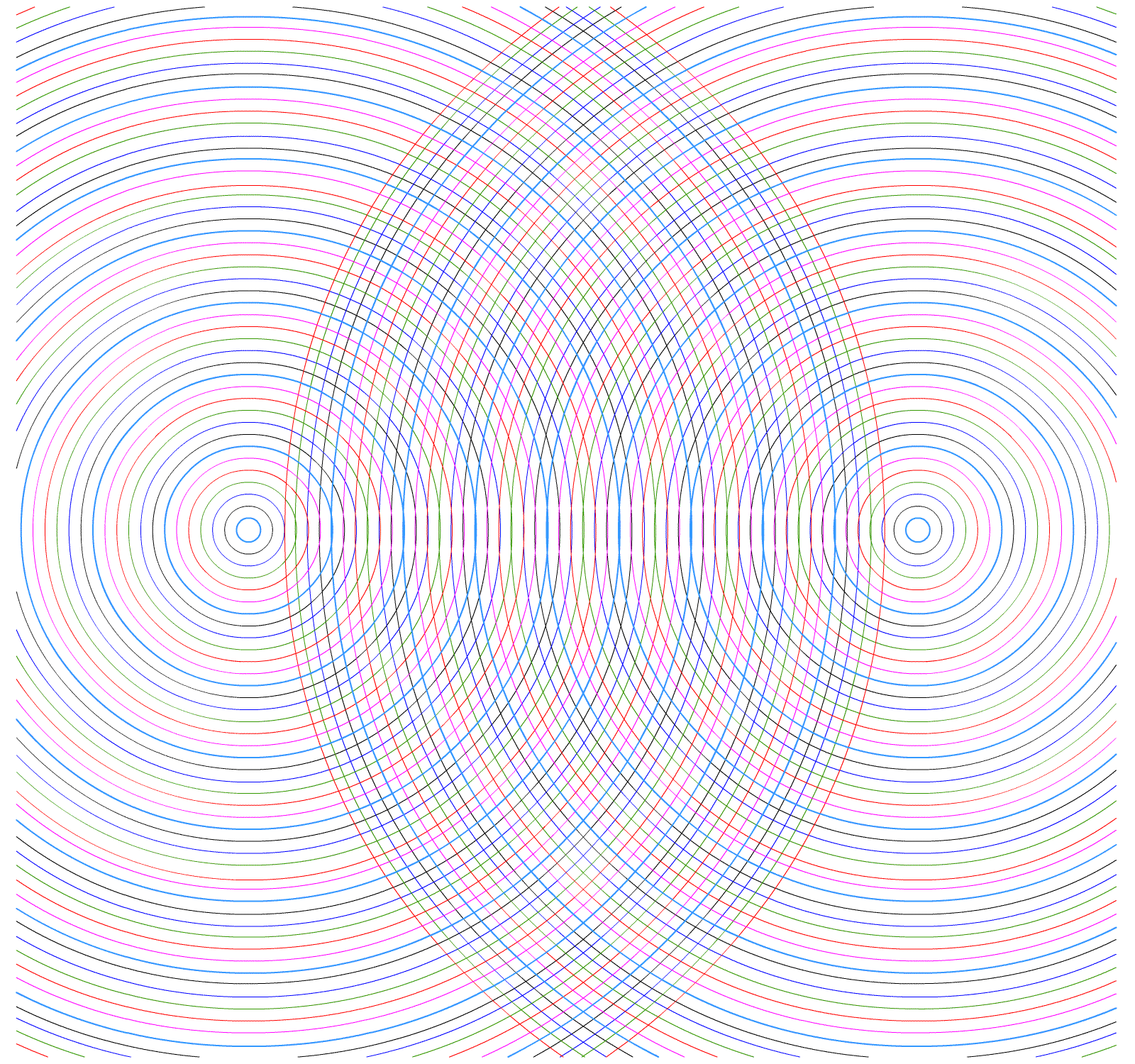 Hyperbelnavigation